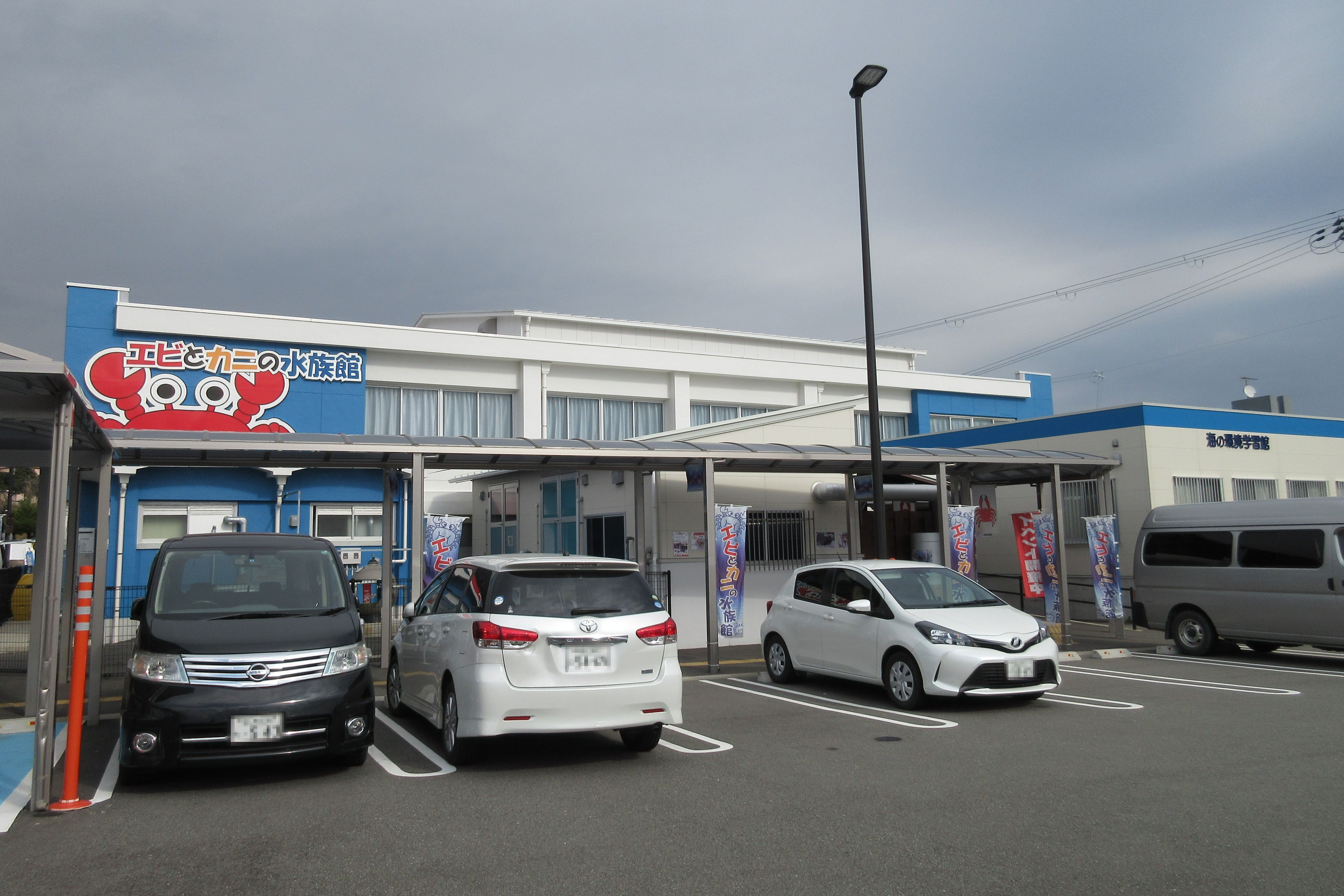 すさみ町立エビとカニの水族館